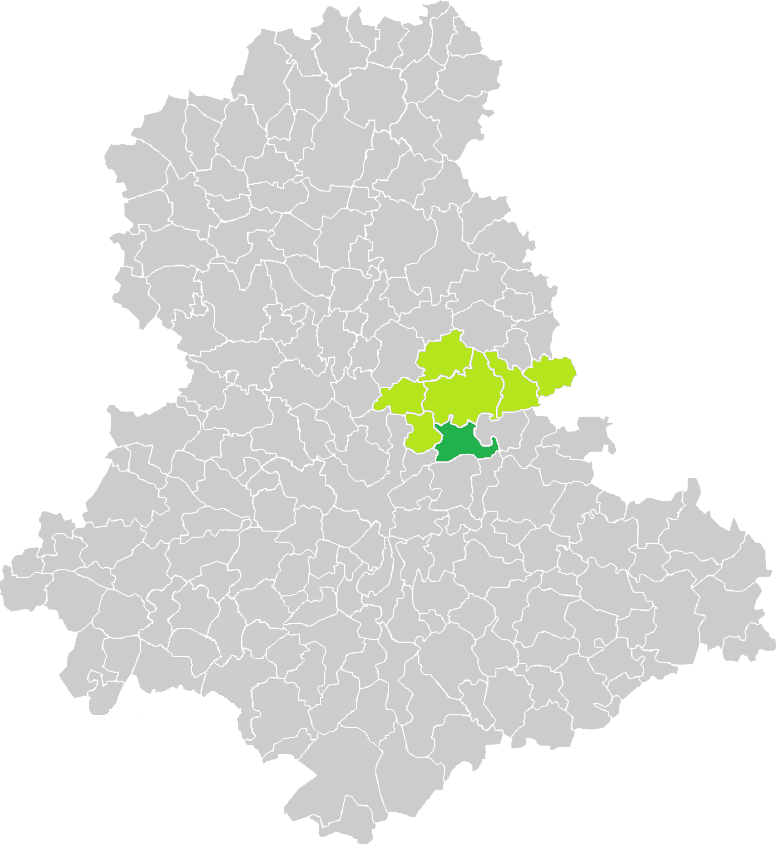 Carte de situation de la commune de Saint-Priest-Taurion (en vert foncé) dans le votre Canton (en vert clair) sur une carte des communes de la Haute-Vienne